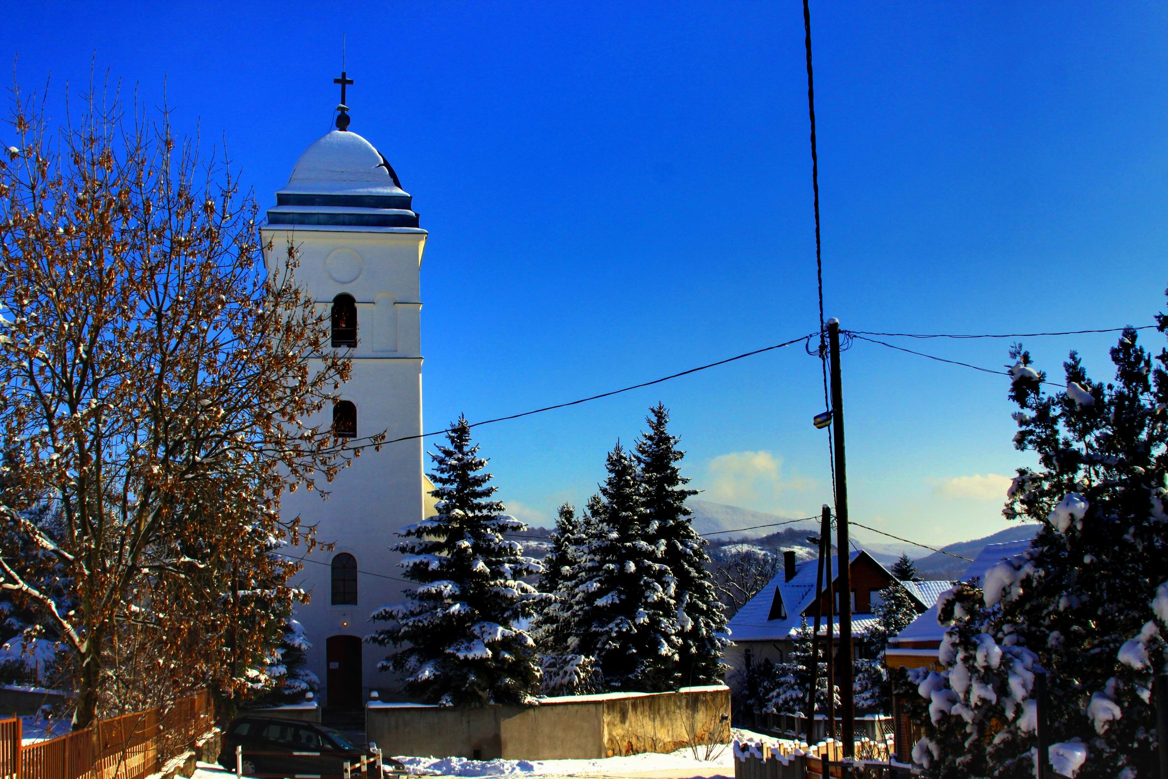 Pásztó, Hasznos, 3065 Hungary